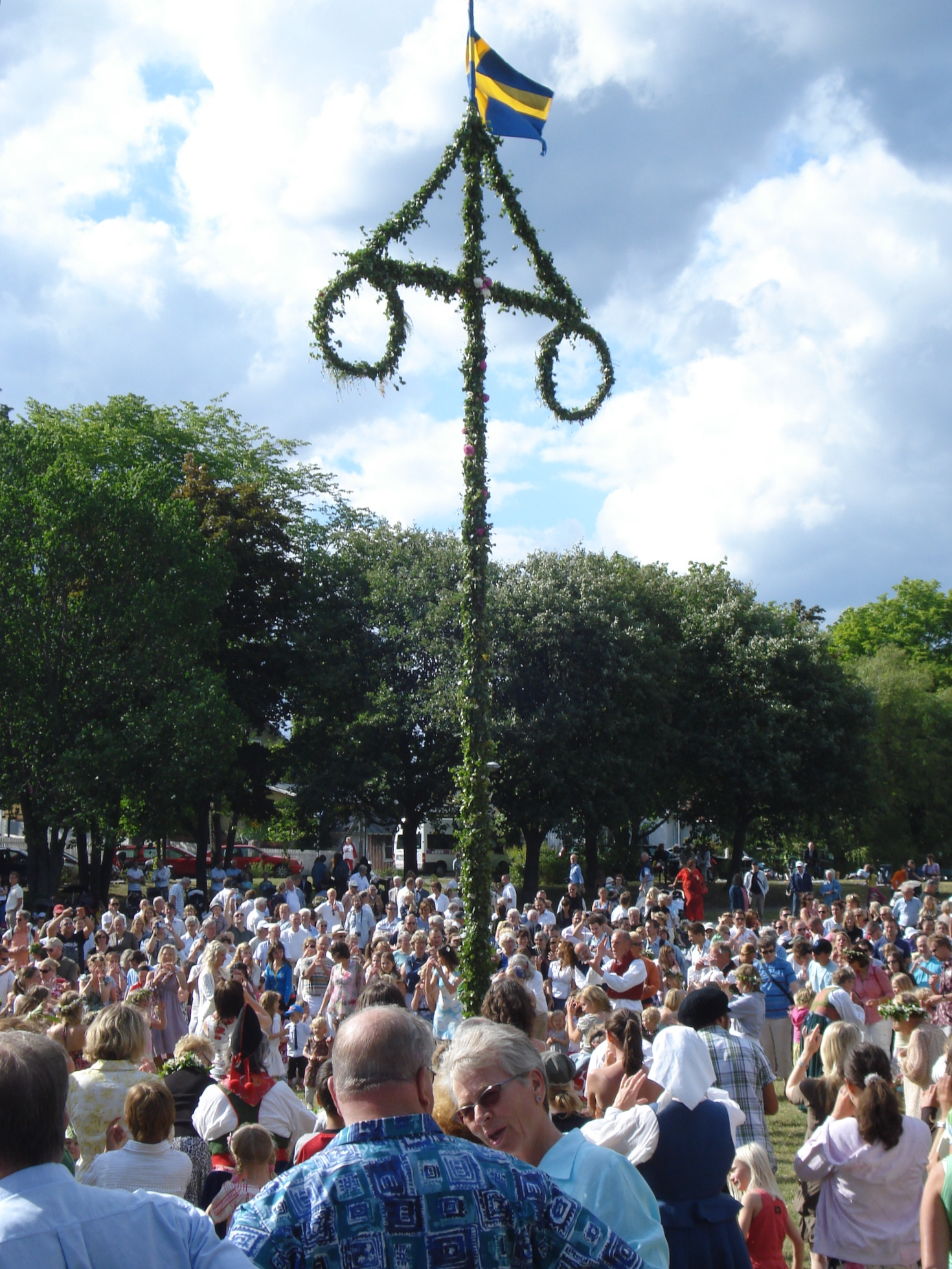 Midsommar i Vaxholm 2008.